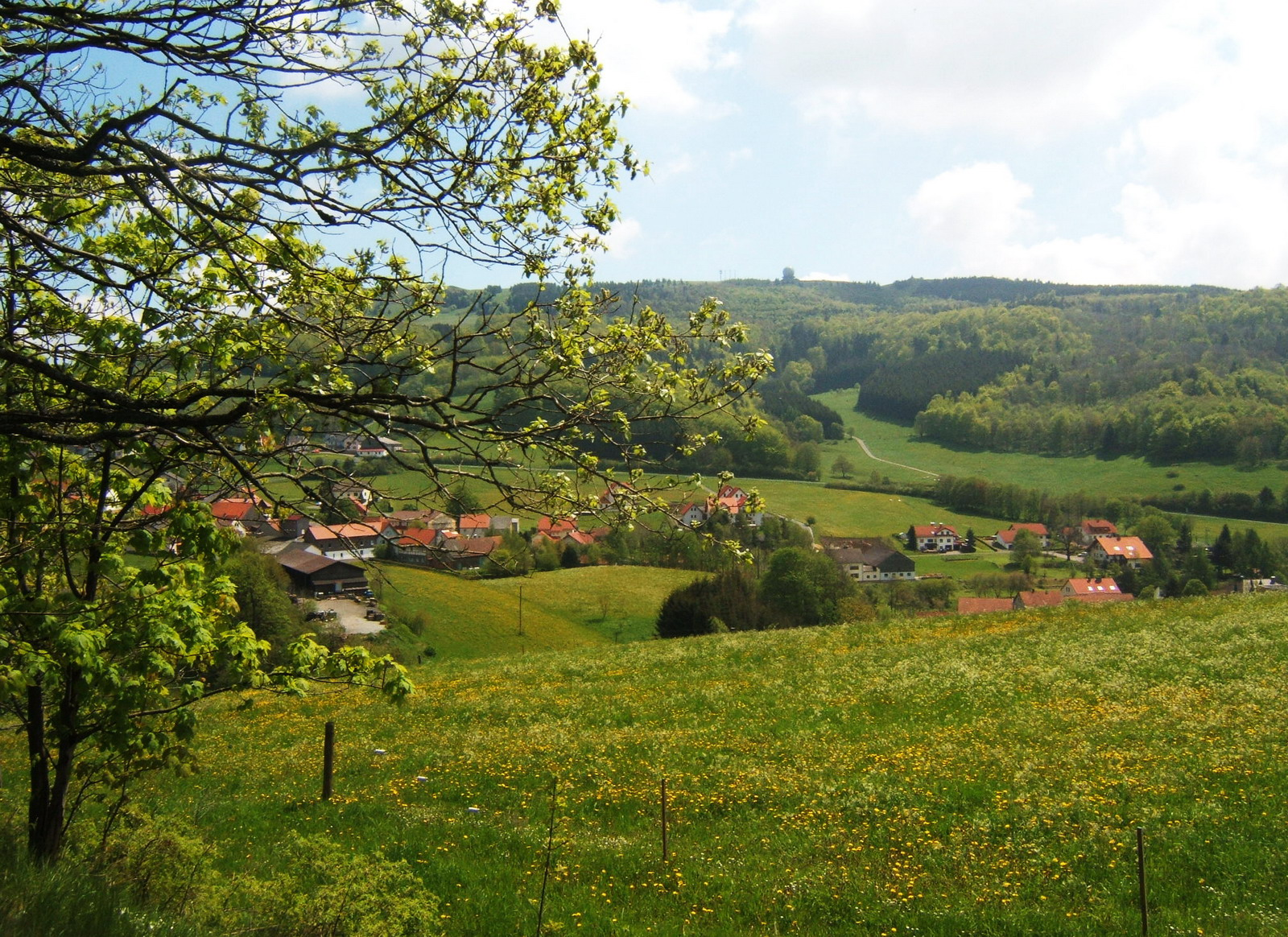 Abtsroda, Ortsteil von Poppenhausen (Wasserkuppe) in der hessischen Rhön